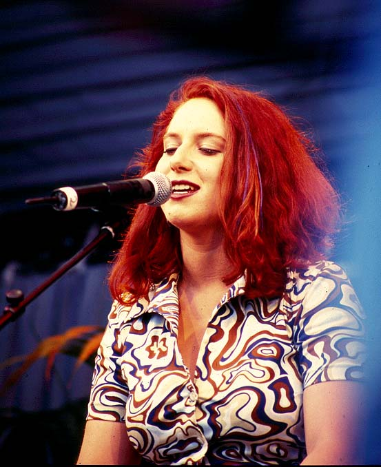 Rebecca Siemoneit-Barum beim Tag der offenen Tür zur 600. Folge der Lindenstraße in Köln-Bocklemünd